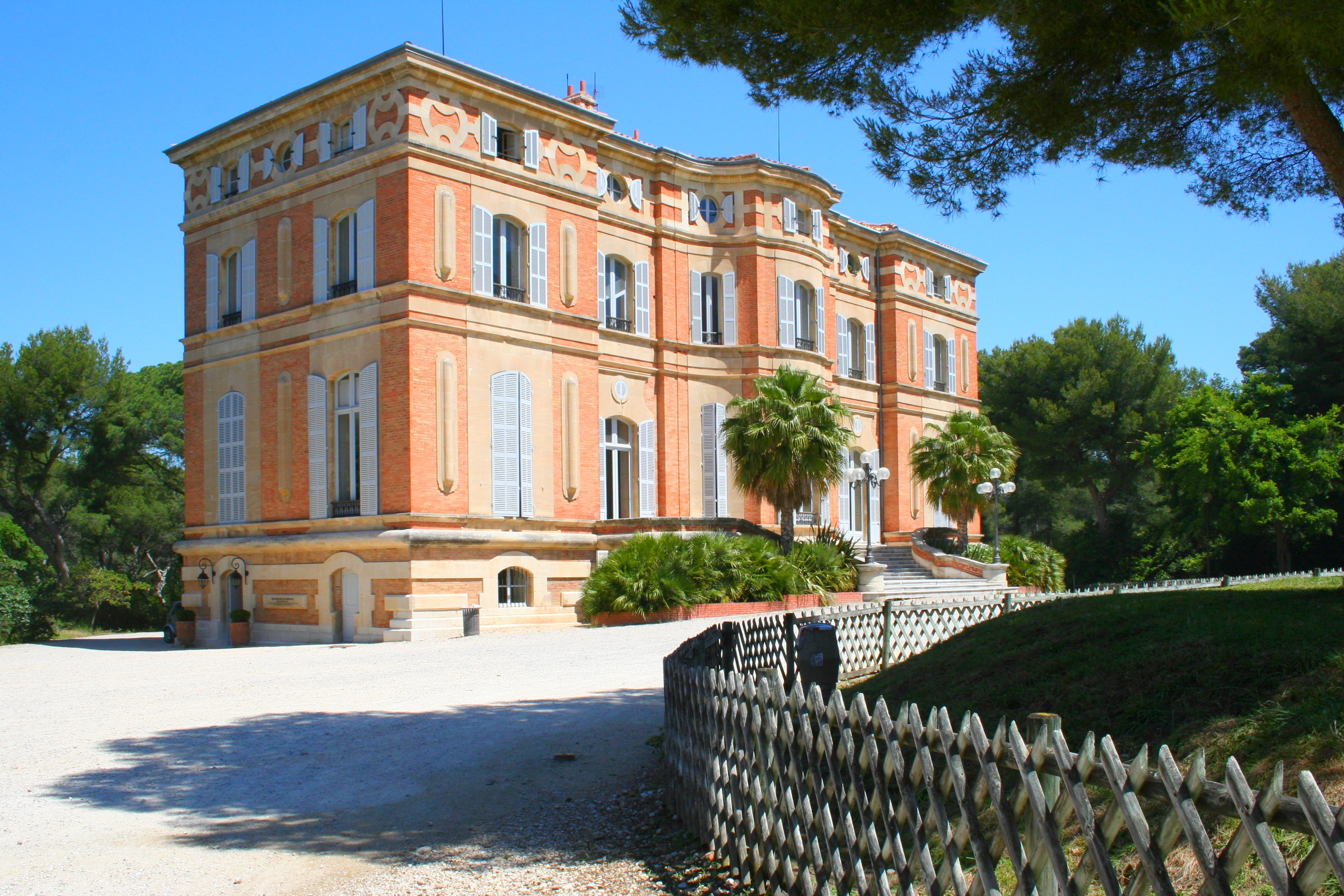 Château Pastré à Marseille situé dans les quartiers sud, à la madrague de Montredon. Il abrite le musée de la faïence.